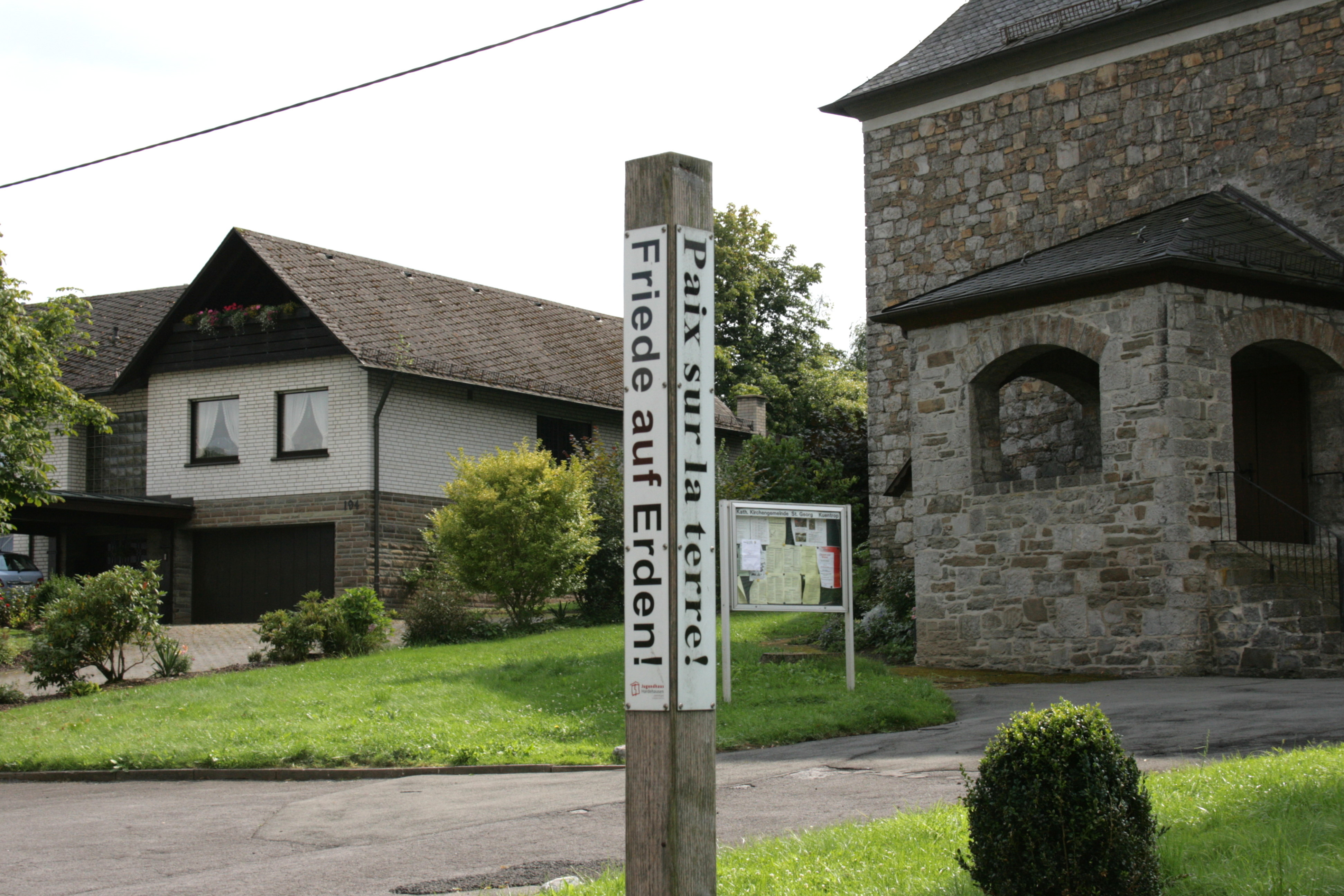 Sankt Georg, Küntroper Straße in Neuenrade-Küntrop